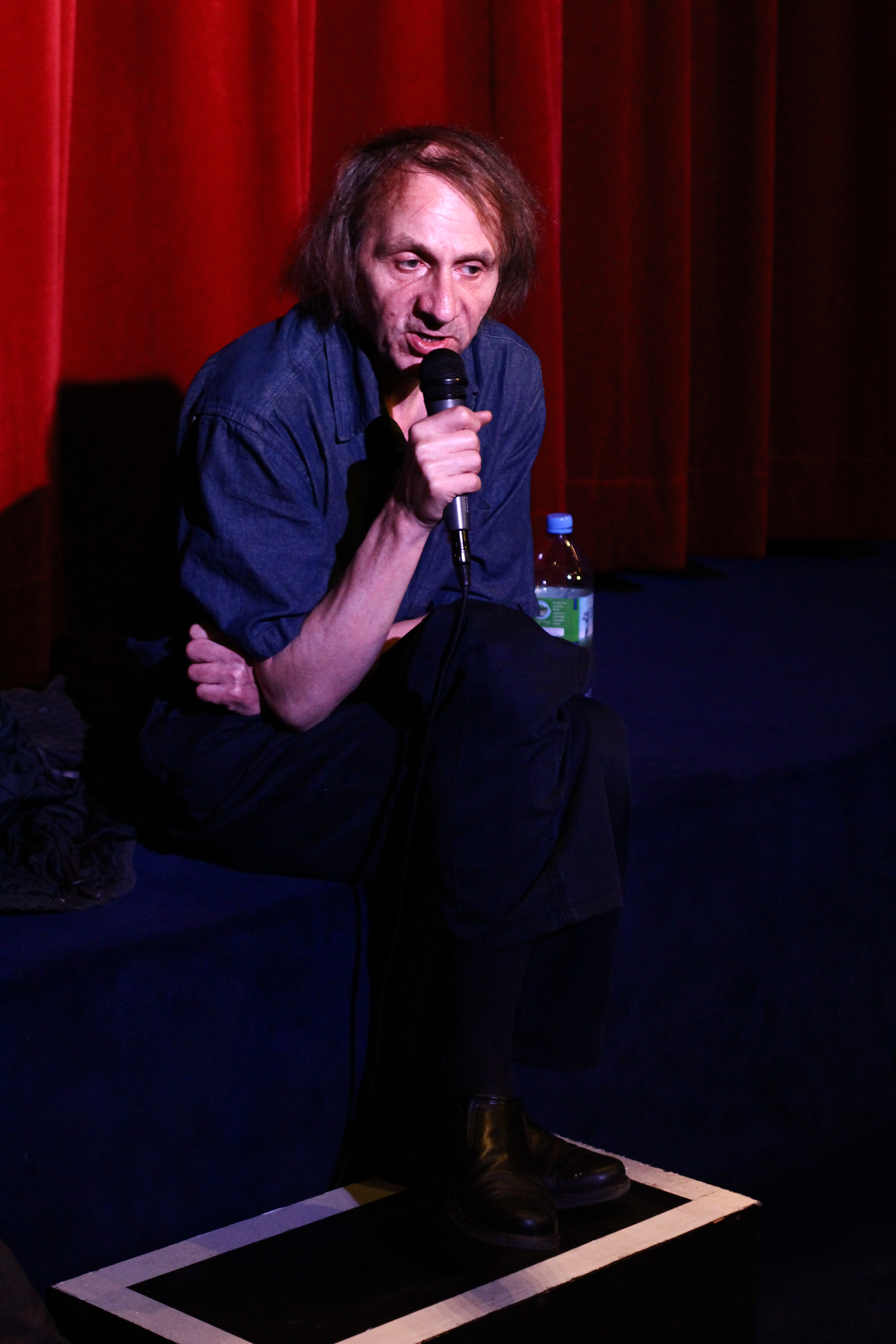 Guillaume Nicloux et Michel Houellebecq - L'enlèvement de Michel Houellebecq